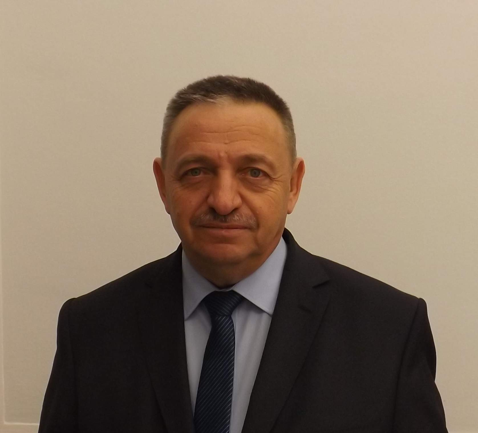 Henryk Kmiecik, poseł Twojego Ruchu.